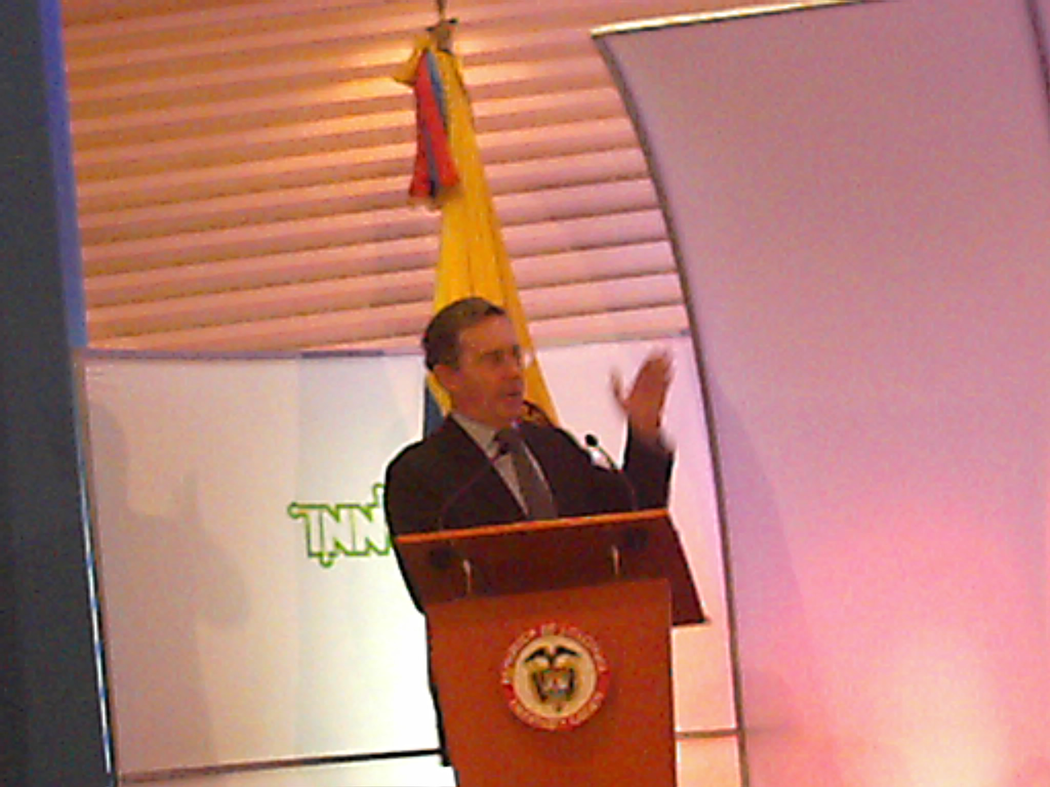 Alvaro Uribe en la entrega de premios INNOVA 2006